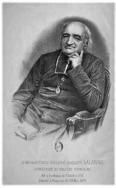 Portrait de Jean-Philippe-Auguste Lalanne (lithographie) directeur du Collège Stanislas de Paris et de l'Institut Stanislas de Cannes